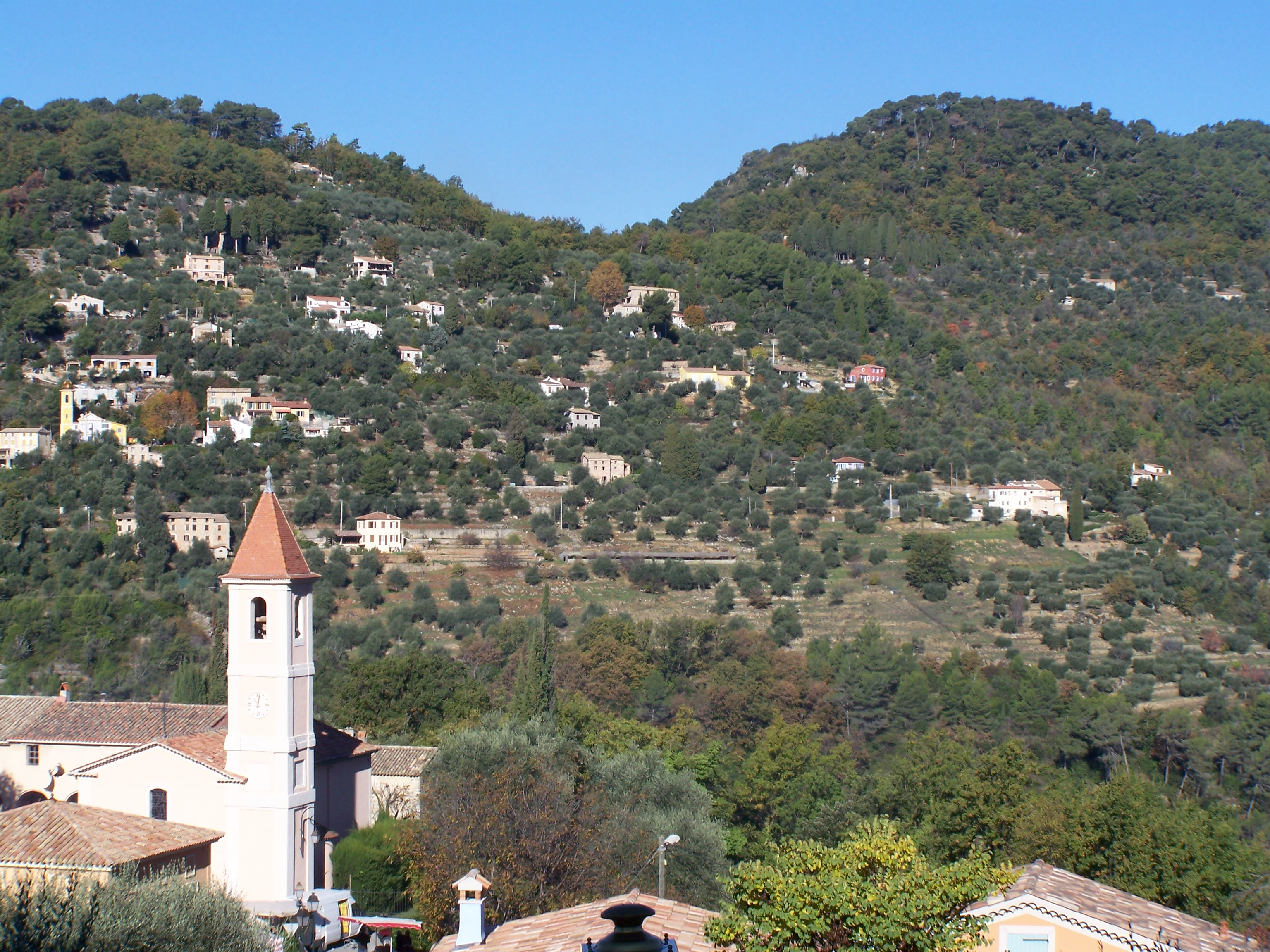 Oliviers "cailletiers" sur les collines de l'arrière-pays niçois, dans la commune de Saint-Blaise du département français des Alpes-Maritimes.